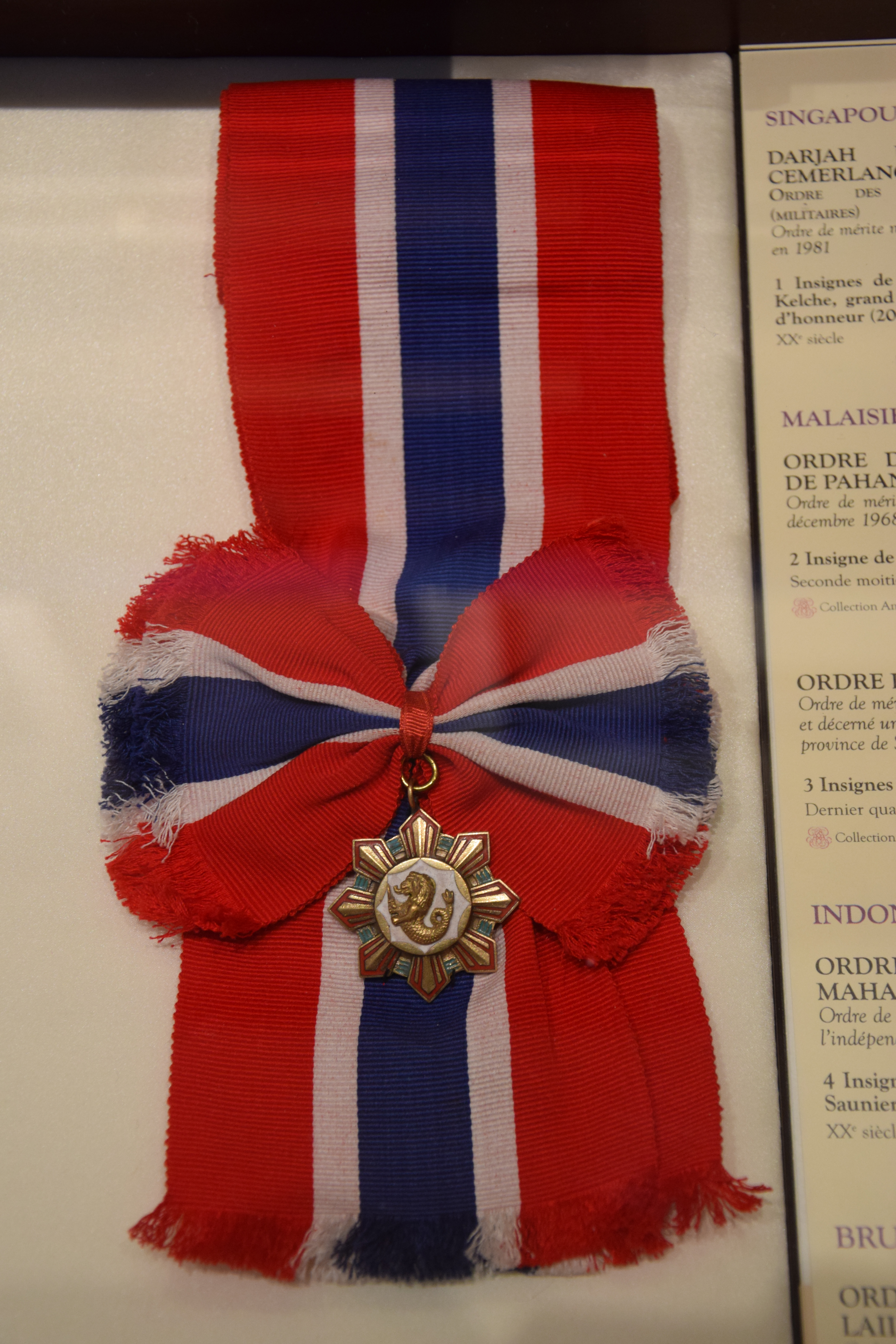 Collections of Musée de la Légion d'honneur